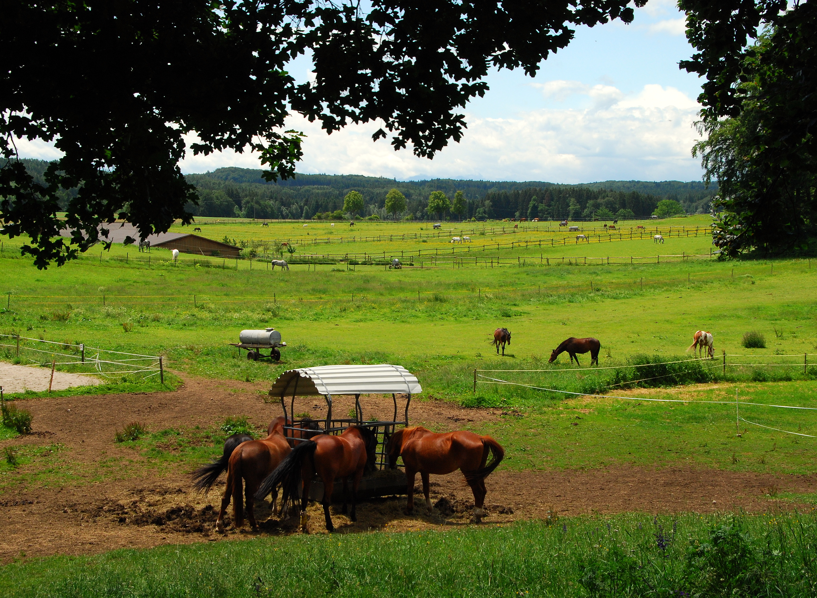 Starnberg. Pferde im Orlov-Gestüt Landstetten.